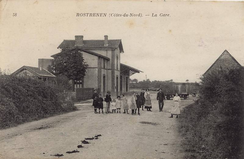 La gare Réseau Breton de Rostrenen